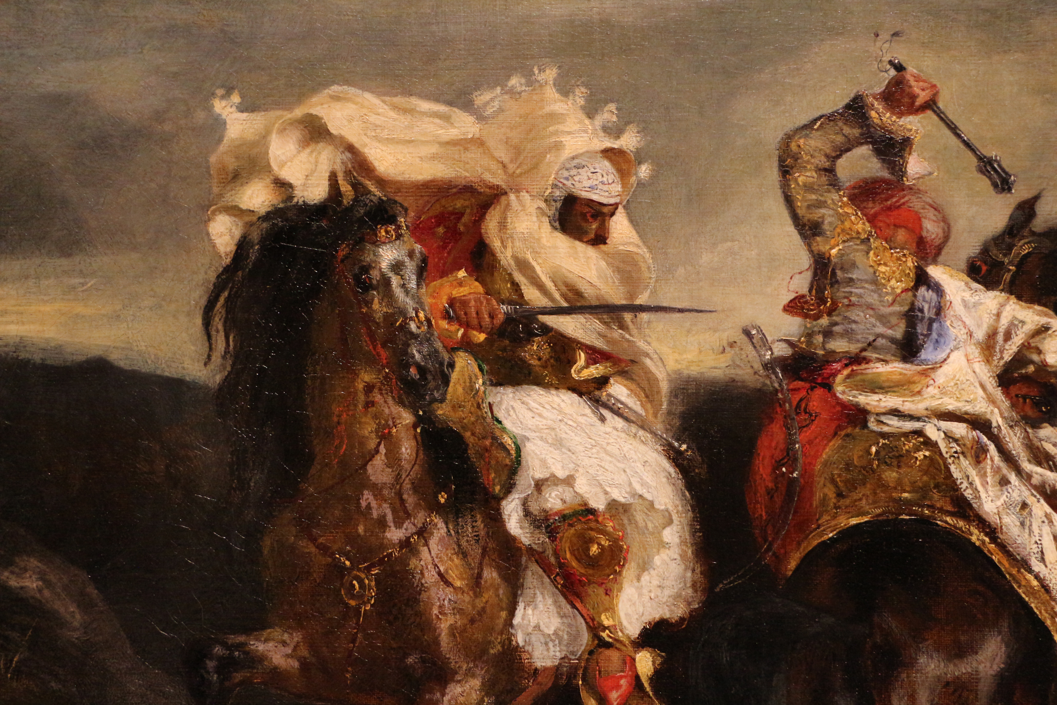 detail